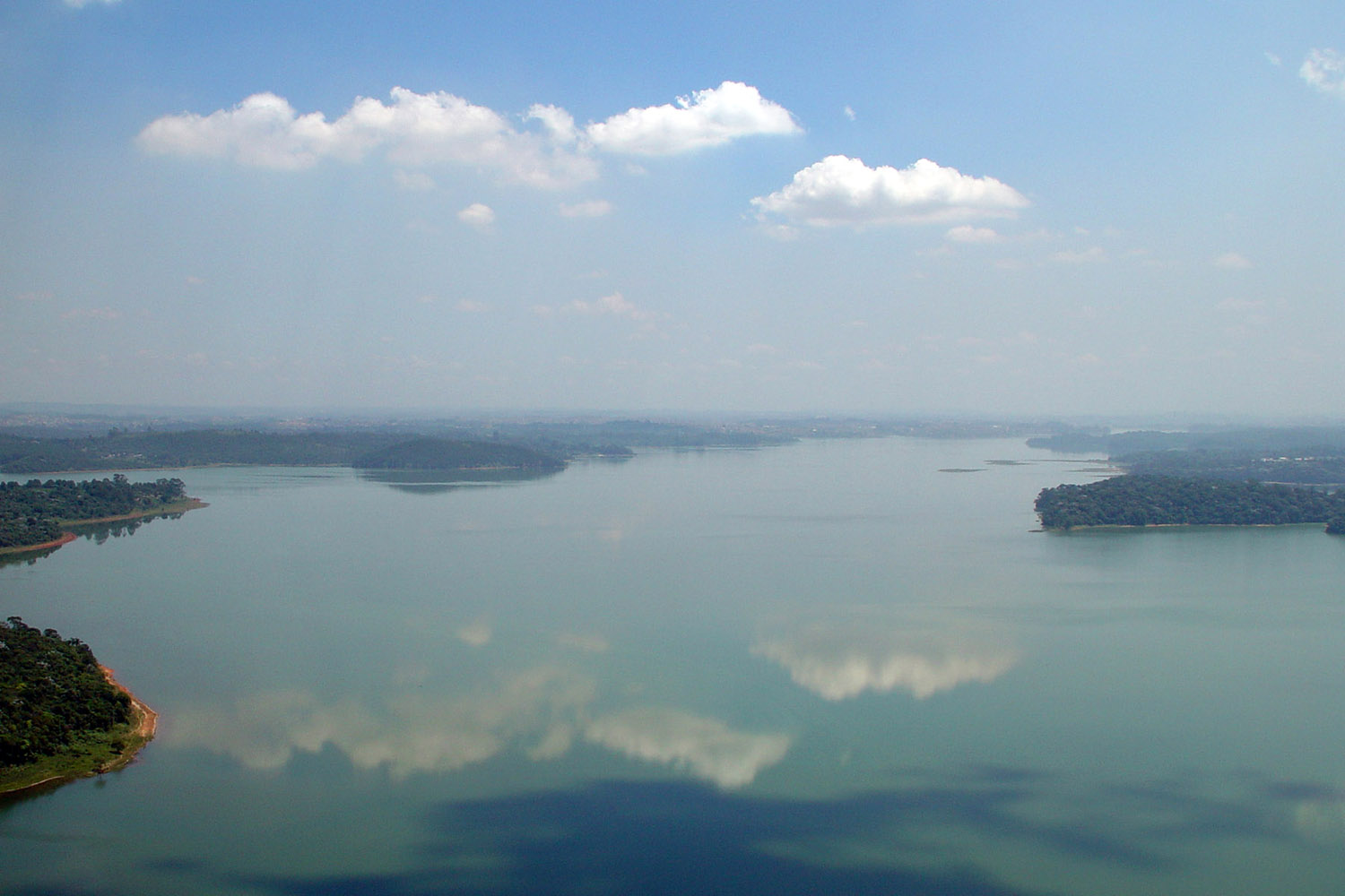 Represa Billings, Grande São Paulo, Espelho d'água